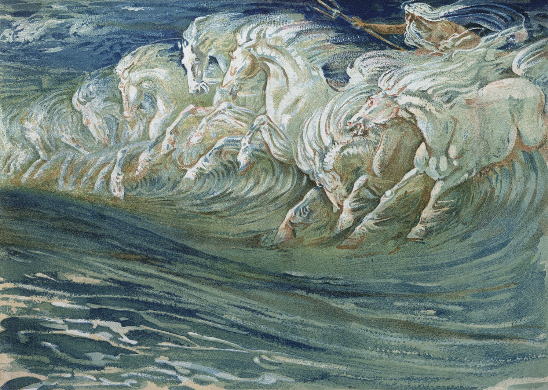 illustration pour 'La Legende mythologique grecque'